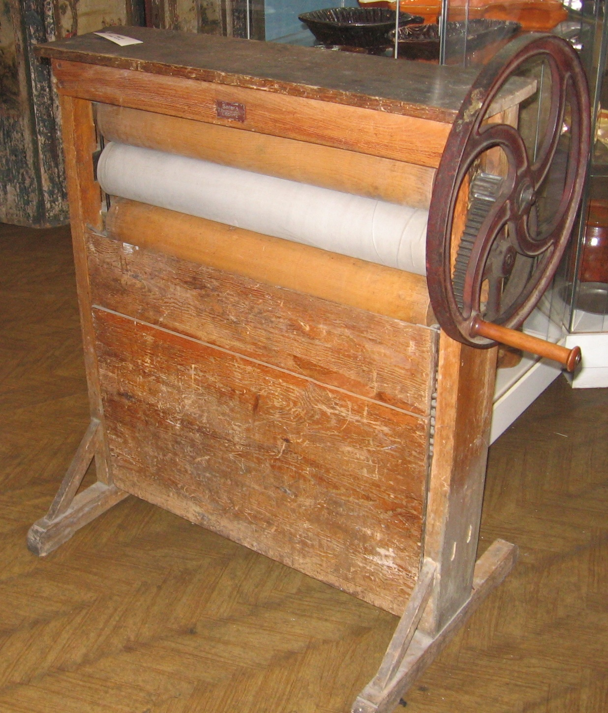 magiel ręczny, ze zbiorów Muzeum Gospodarstwa Domowego w Ziębicach